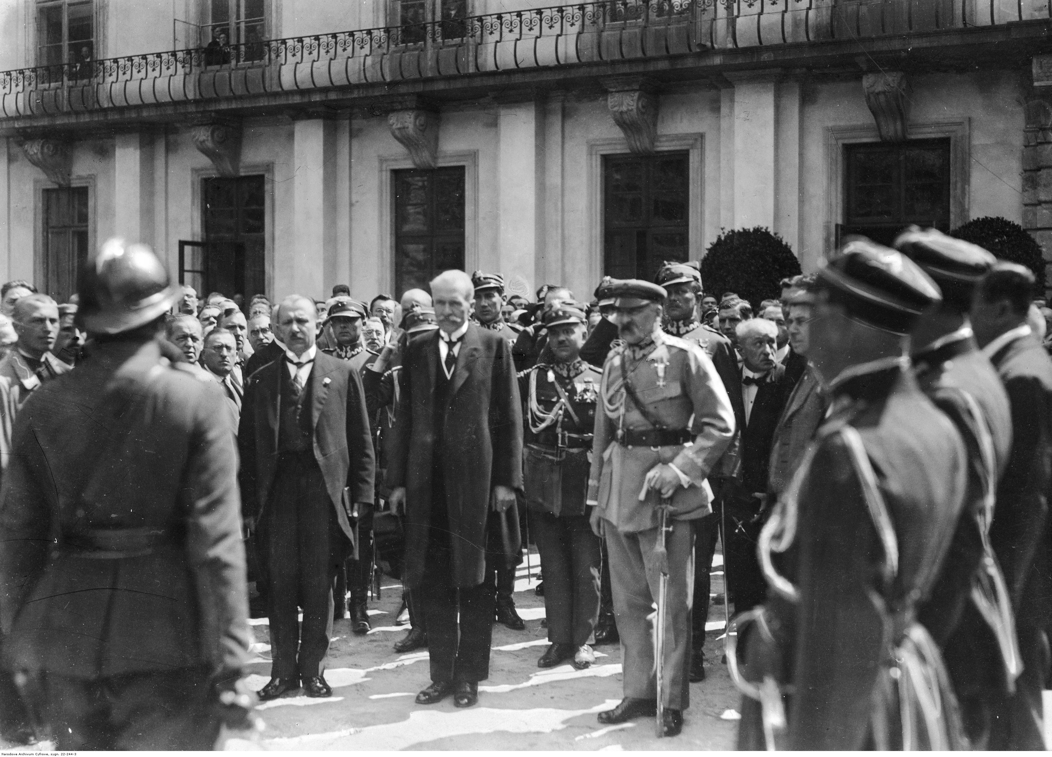 Fragment uroczystości. Na dziedzińcu Zamku Królewskiego stoją: prezydent Ignacy Mościcki (w środku, na drugim planie, siwy, z wąsami), marszałek Polski Józef Piłsudski (na prawo od marszałka Piłsudskiego), premier Kazimierz Bartel (na lewo od prezydenta Mościckiego), szef Gabinetu Ministra Spraw Wojskowych, płk Józef Beck (za prezydentem Mościckim) i adiutant prezydenta I. Mościckiego ppłk Juliusz Ulrych (na prawo za prezydentem).